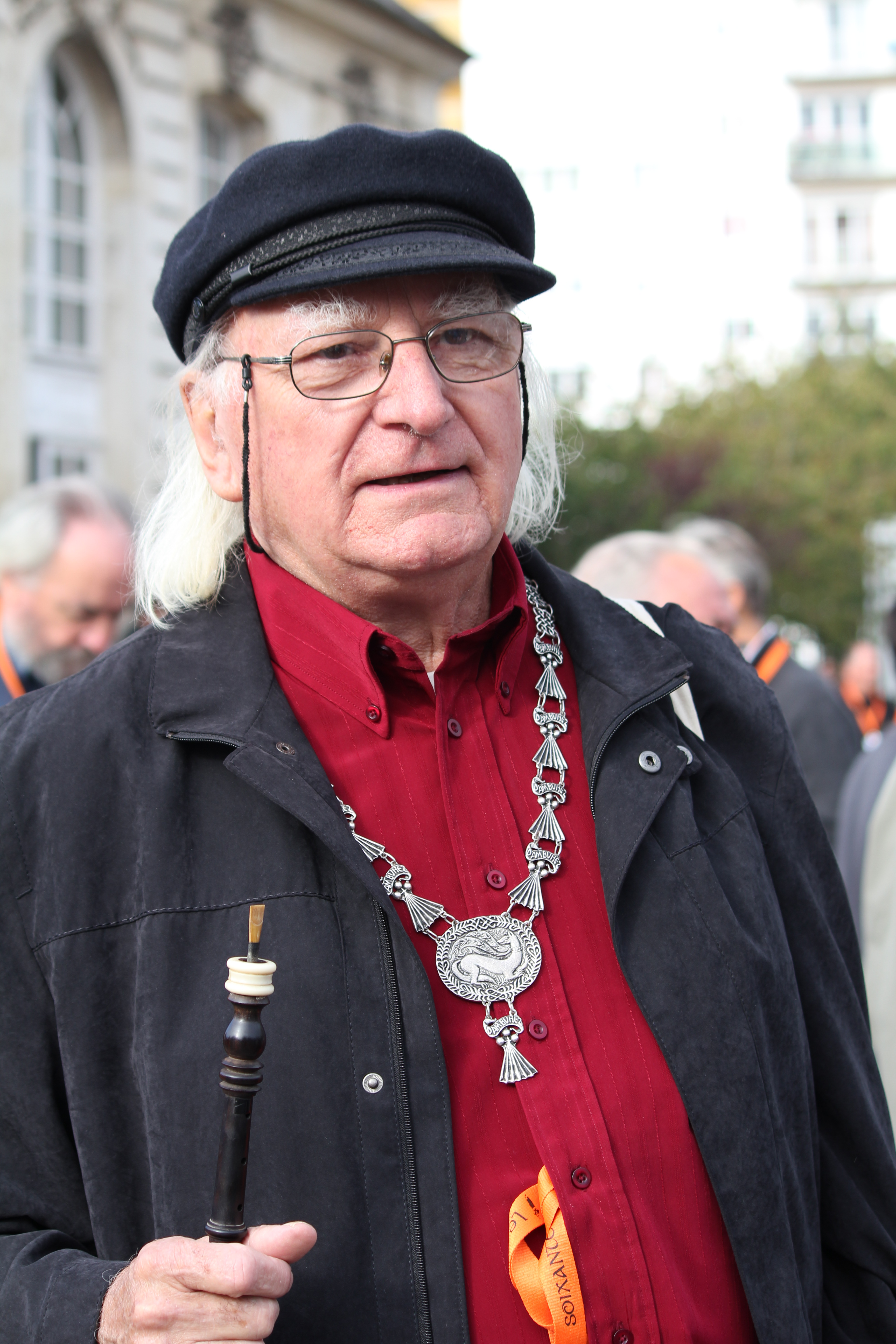 Parade des anciens musiciens du Bagad de Lann-Bihoué organisé le 15 septembre 2012 dans les rues de Lorient.